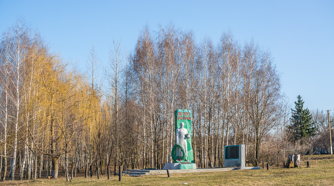 Пам'ятник воїнам-односельчанам., Юрченкове